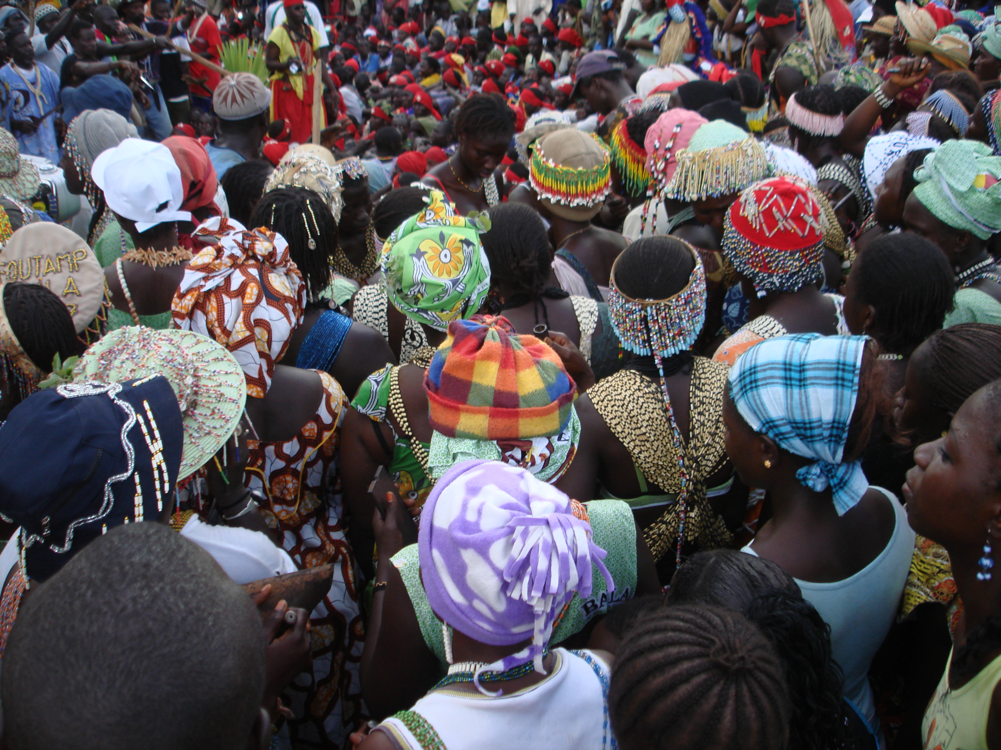 Couvre-chefs colorés lors des préparatifs au boukout (rites d'initiation diola) de Baïla (Casamance, Sénégal)